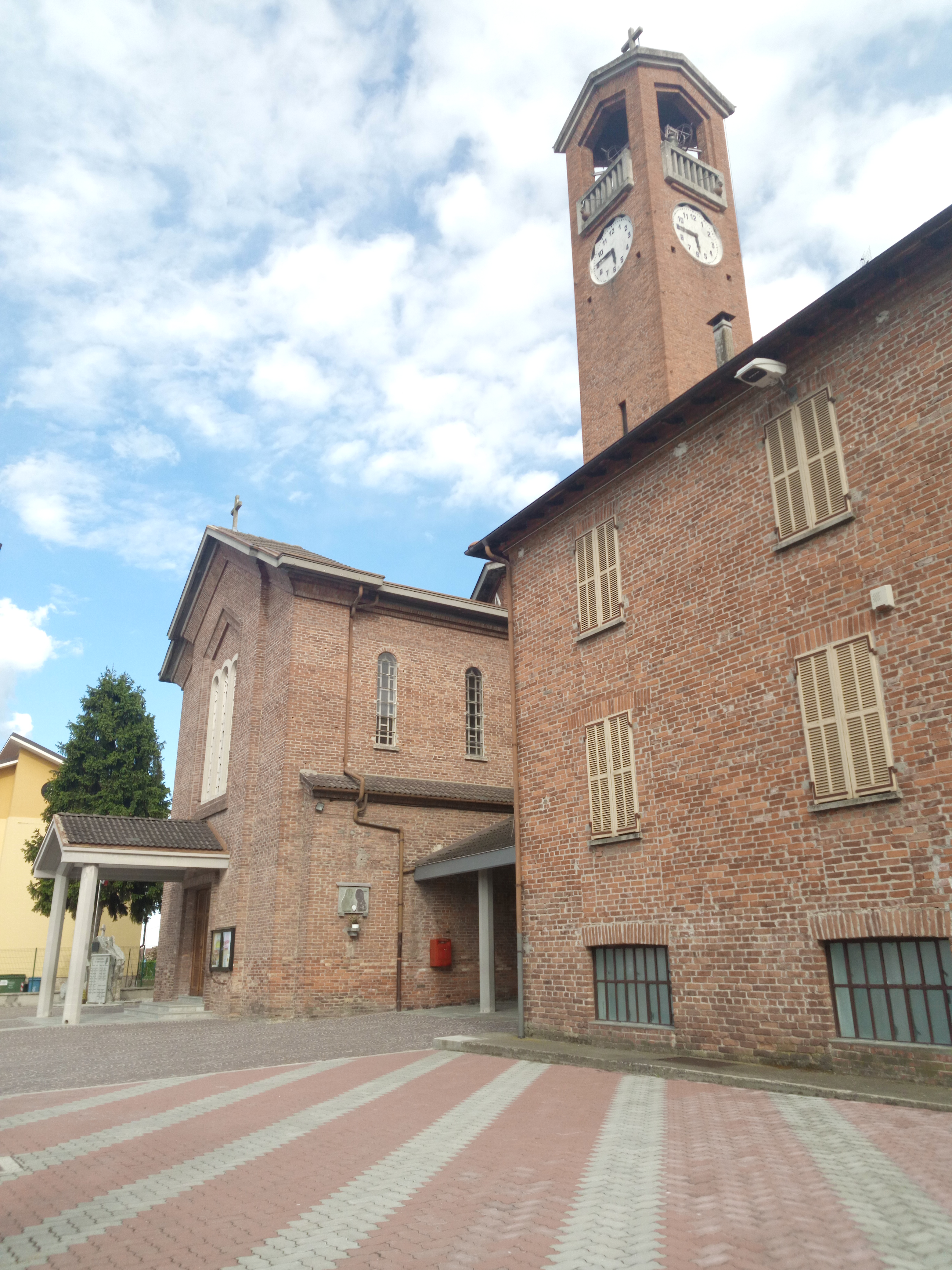 Bombonina, frazione di cuneo: la chiesa di San Matteo e Beata Vergine Addolorata.